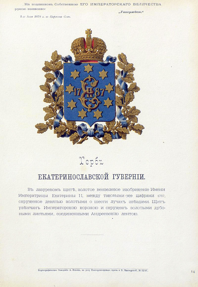 Official Russian Empire coat of arms Ekaterinoslav Governorate. Гласный герб Российской Империи Екатеринославской губернии с официальным описанием в Гербовнике Бенке. Утверждён Императором Всероссийским Александром Вторым в 1878 году.